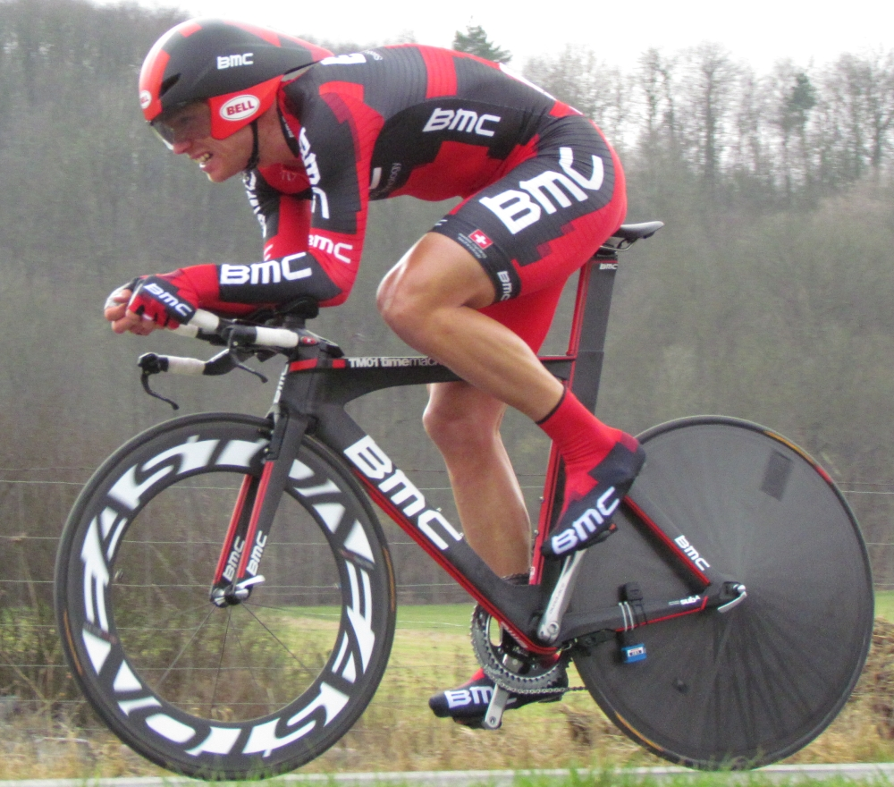 Hushovd paris nice 2012